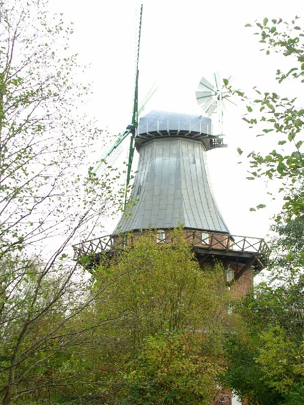 Vincent-Lübeck-Gymnasium: Windmühle am Schiffertor